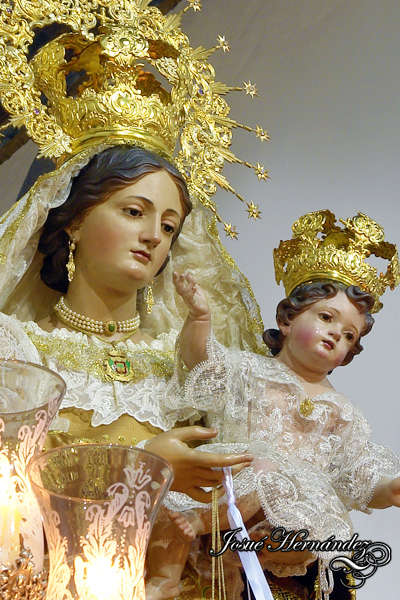 Nuestra Señora del Carmen Coronada Villa de La Orotava, Tenerife.